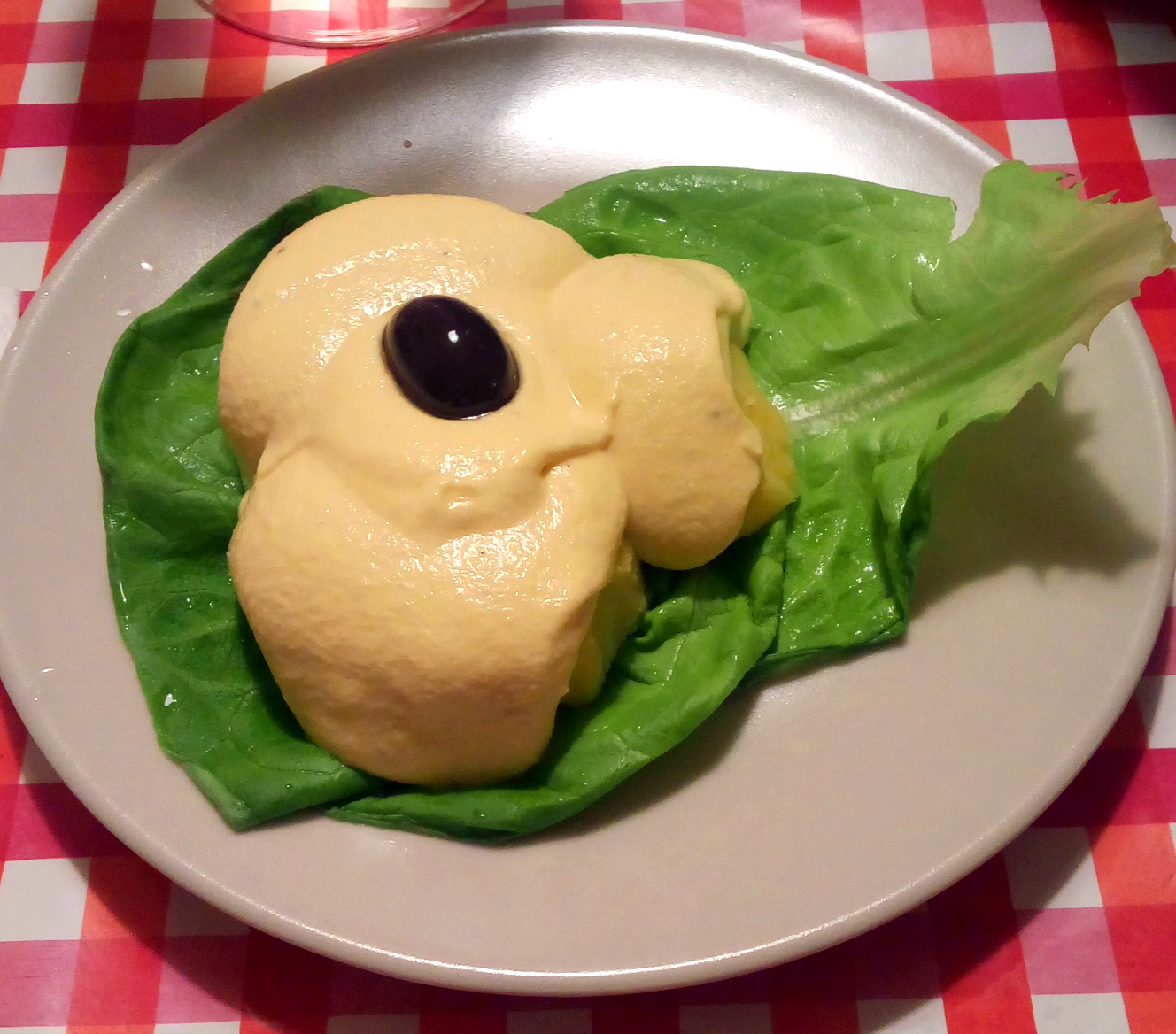 Papa a la huancaina con aceituna botija